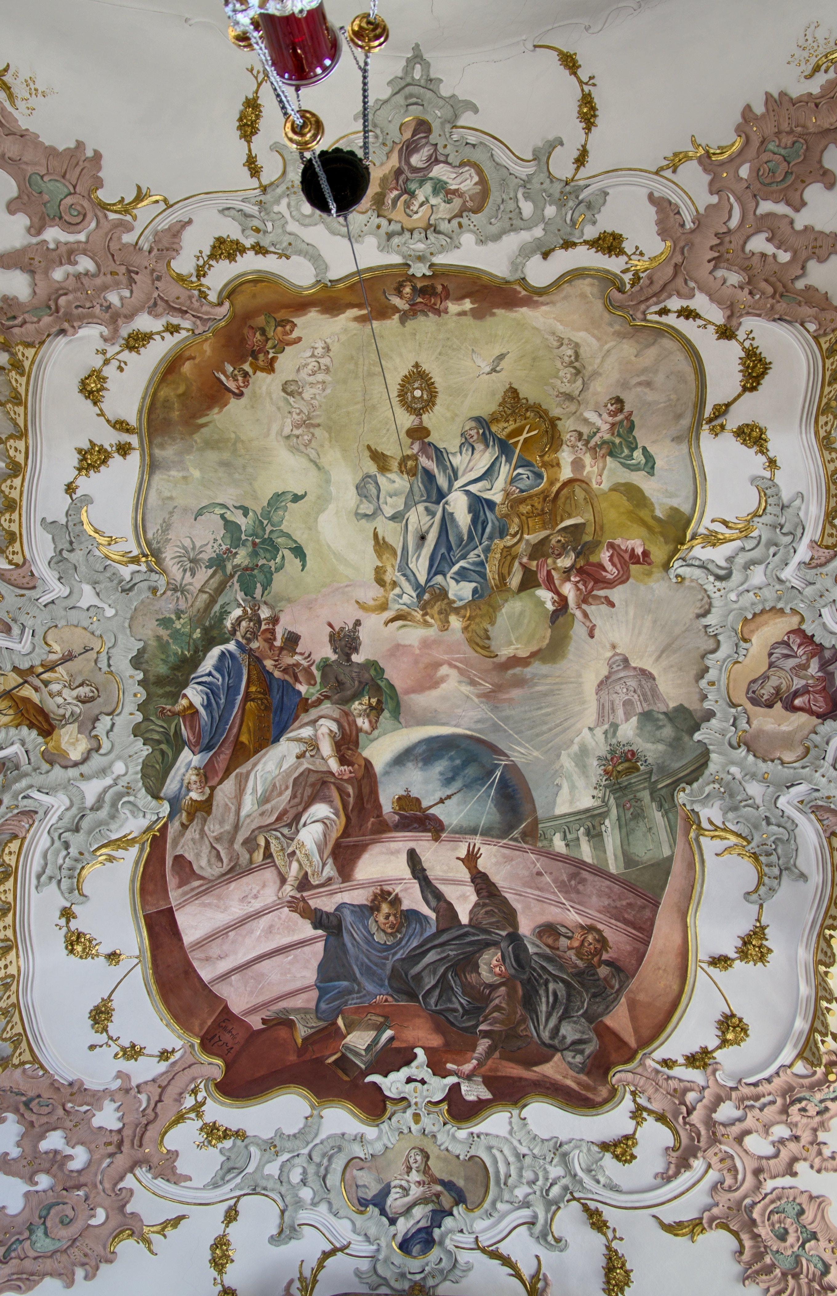 Bilder der Pfarrkirche St. Stephan in Kirchdorf. Die Ortschaft gehört zu Bad Wörishofen